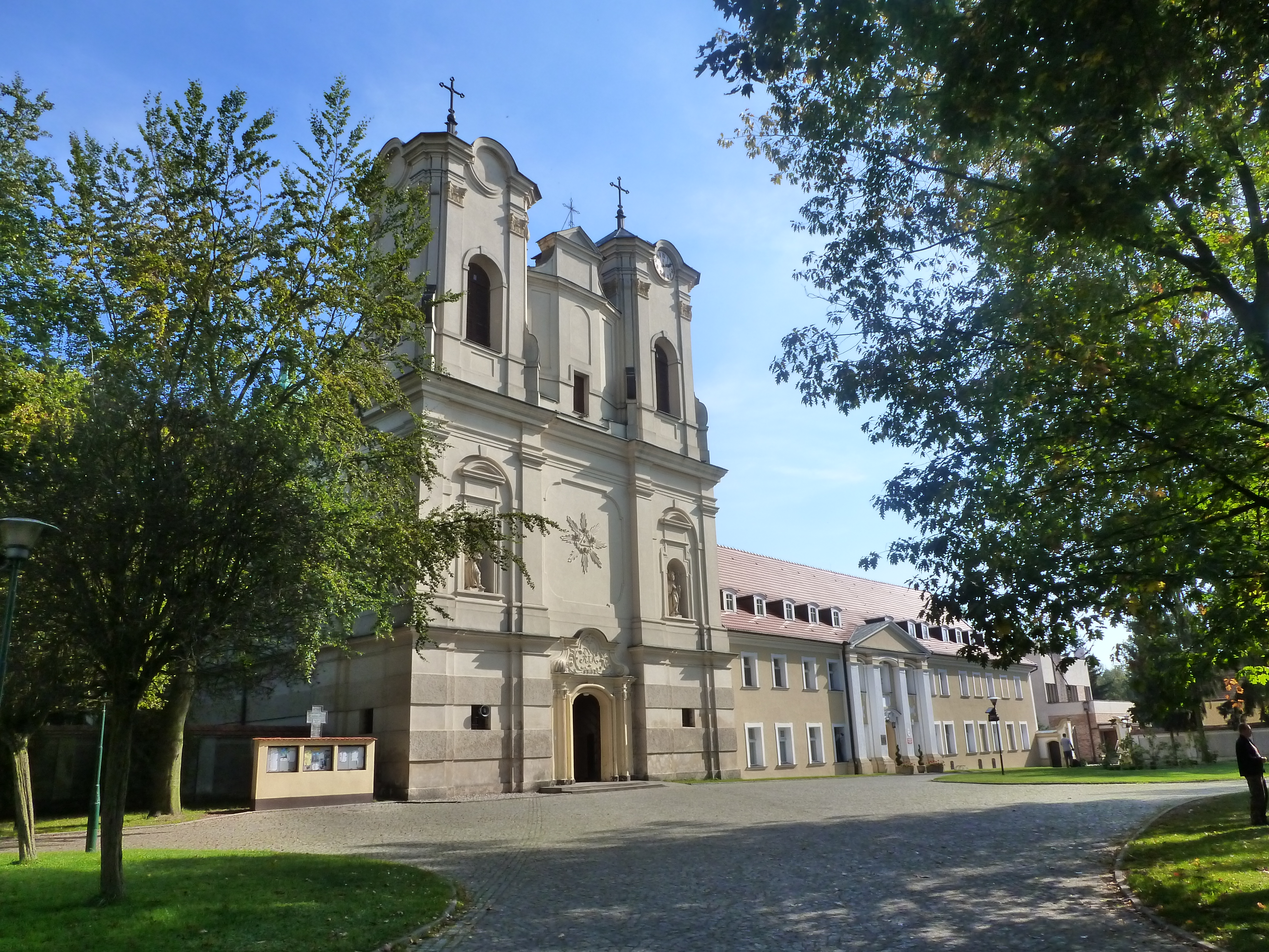 Obra, kościół, w zespole klasztornym cystersów, ob. misjonarzy oblatów, mur., 1618, 1753-1755, 1920